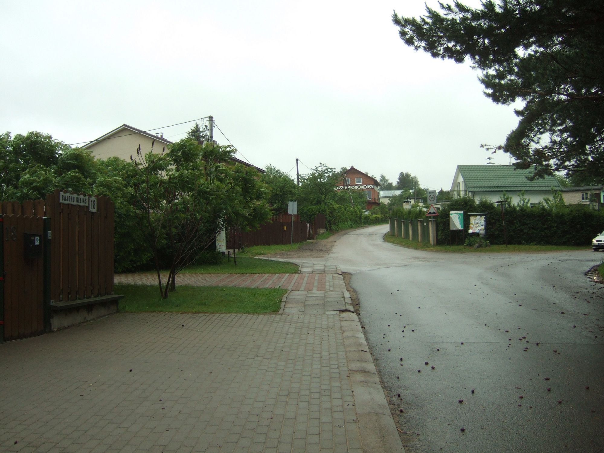 Bajorai (Vilniaus miesto dalis)